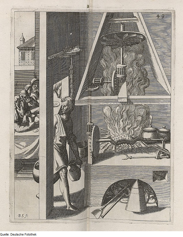 Original image description from the Deutsche Fotothek Mühle & Dampf